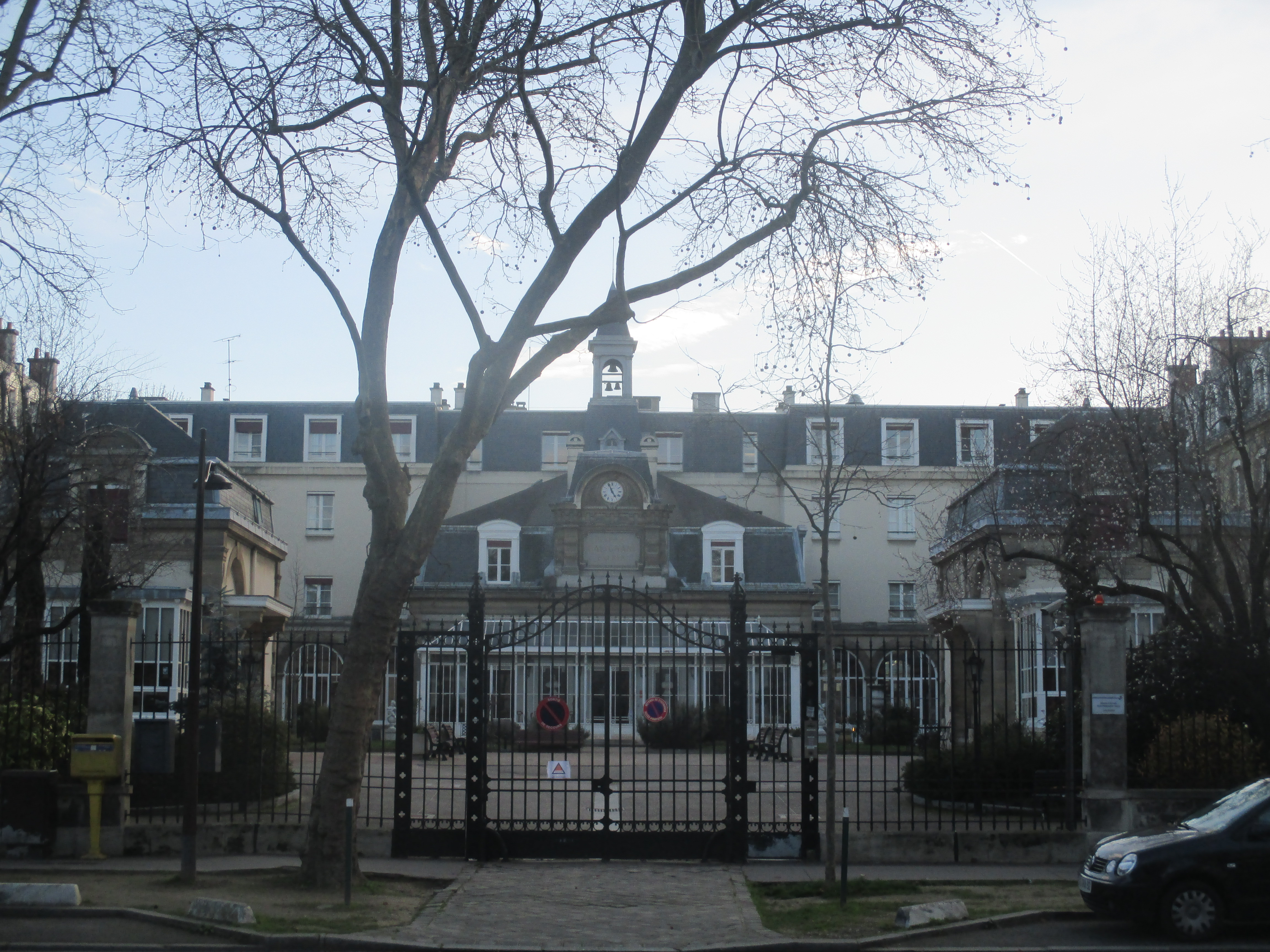 Entrée de la maison de retraite Galignani au 89 boulevard Bineau à Neuilly-sur-Seine.